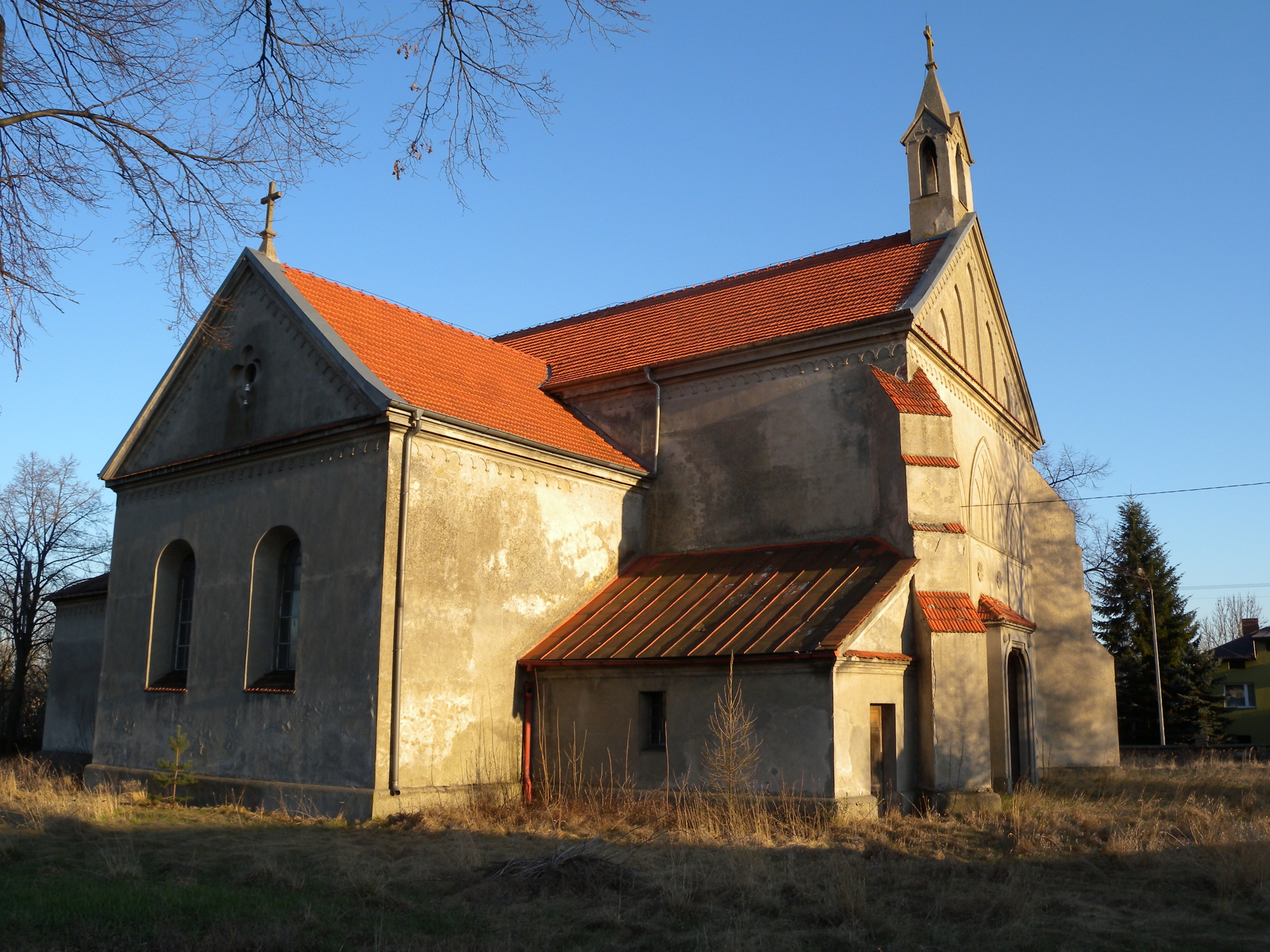 Kościół filialny pw. św. Marcina, I poł. XIX w. Rynek Kościuszki Widawa, Widawa